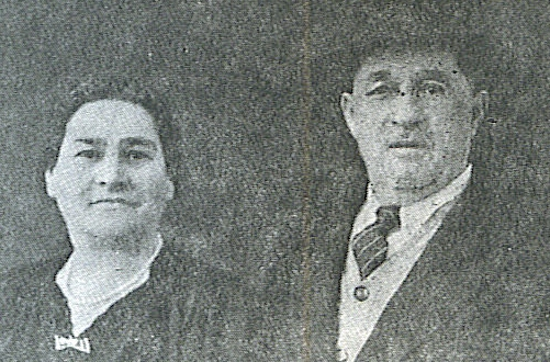 שושנה וhe:משה רסקין